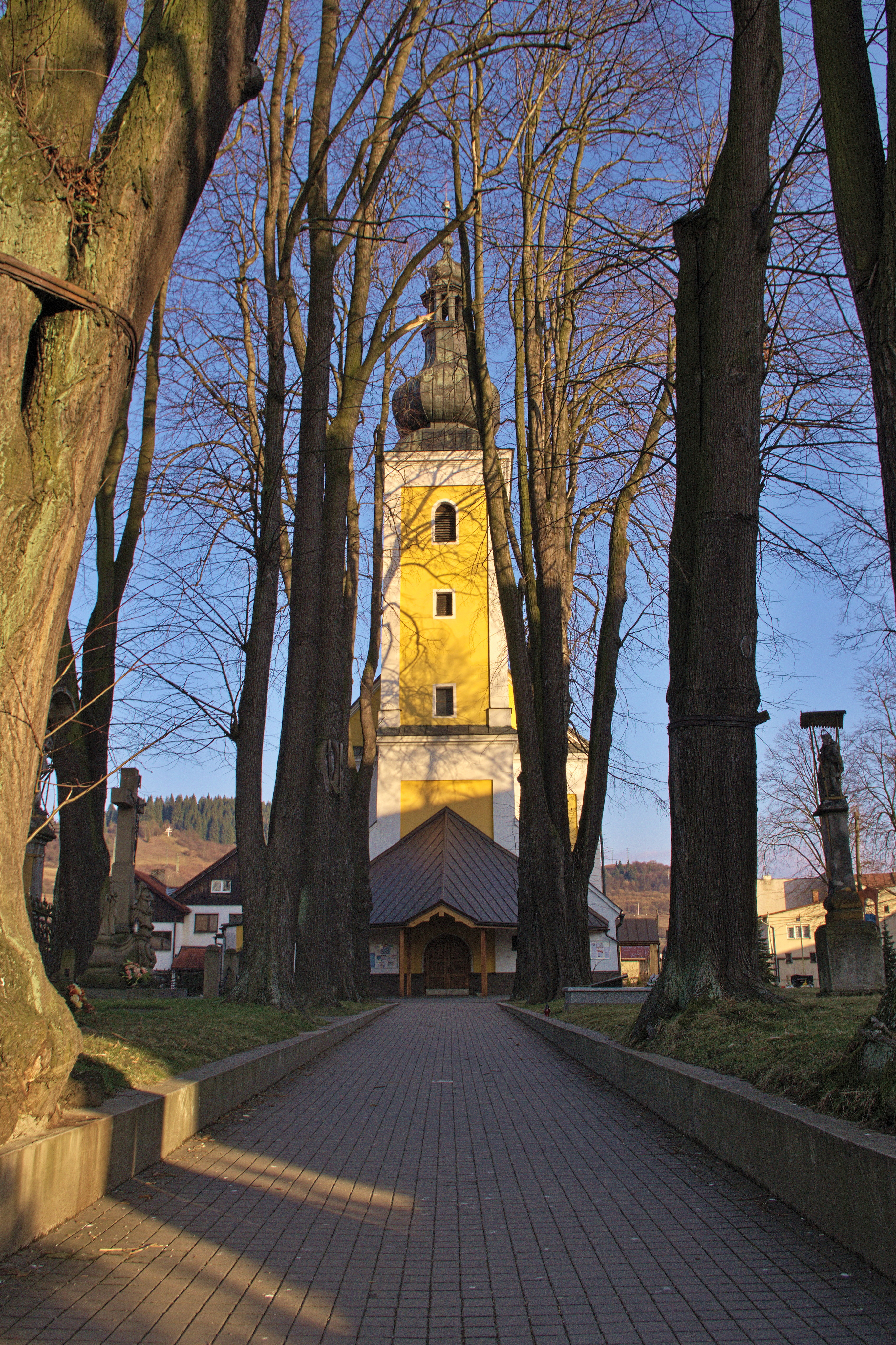 Kostol